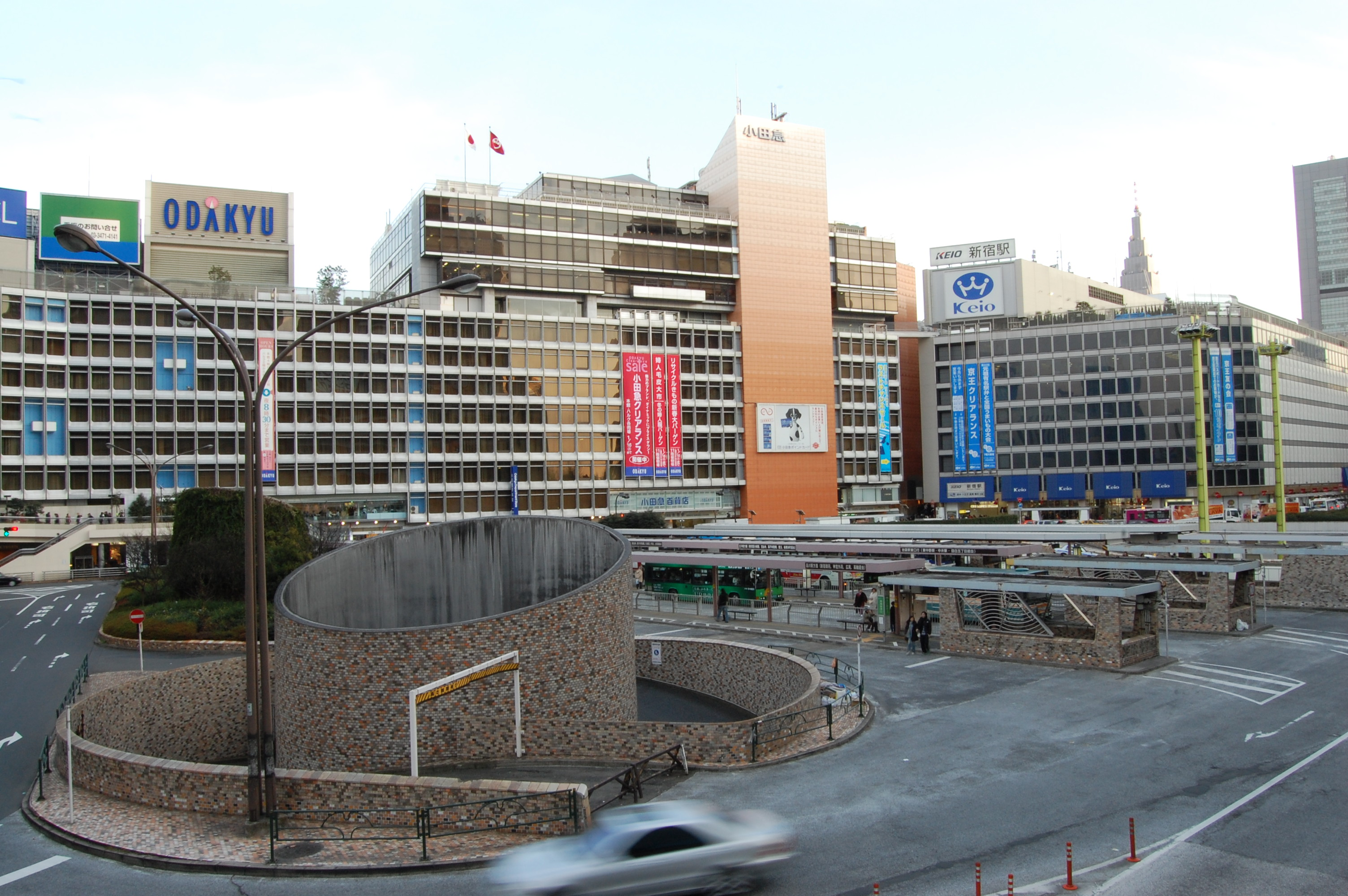 新宿駅西口前 機材 NIKON D40